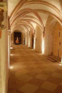 Vue du cloître, intérieur, photo prise de nuit.